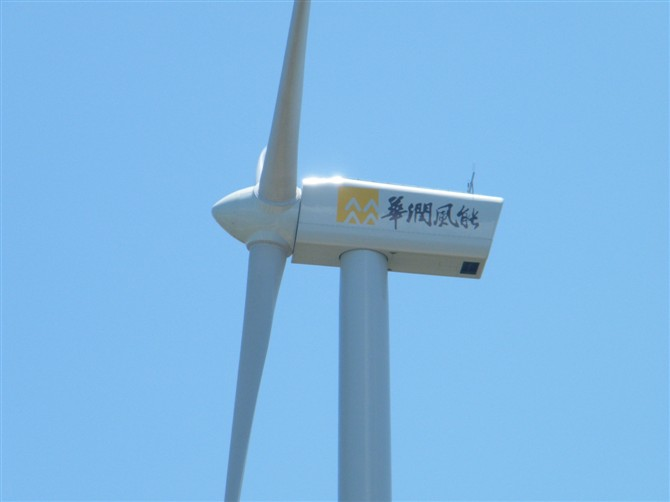 广澳华润风能